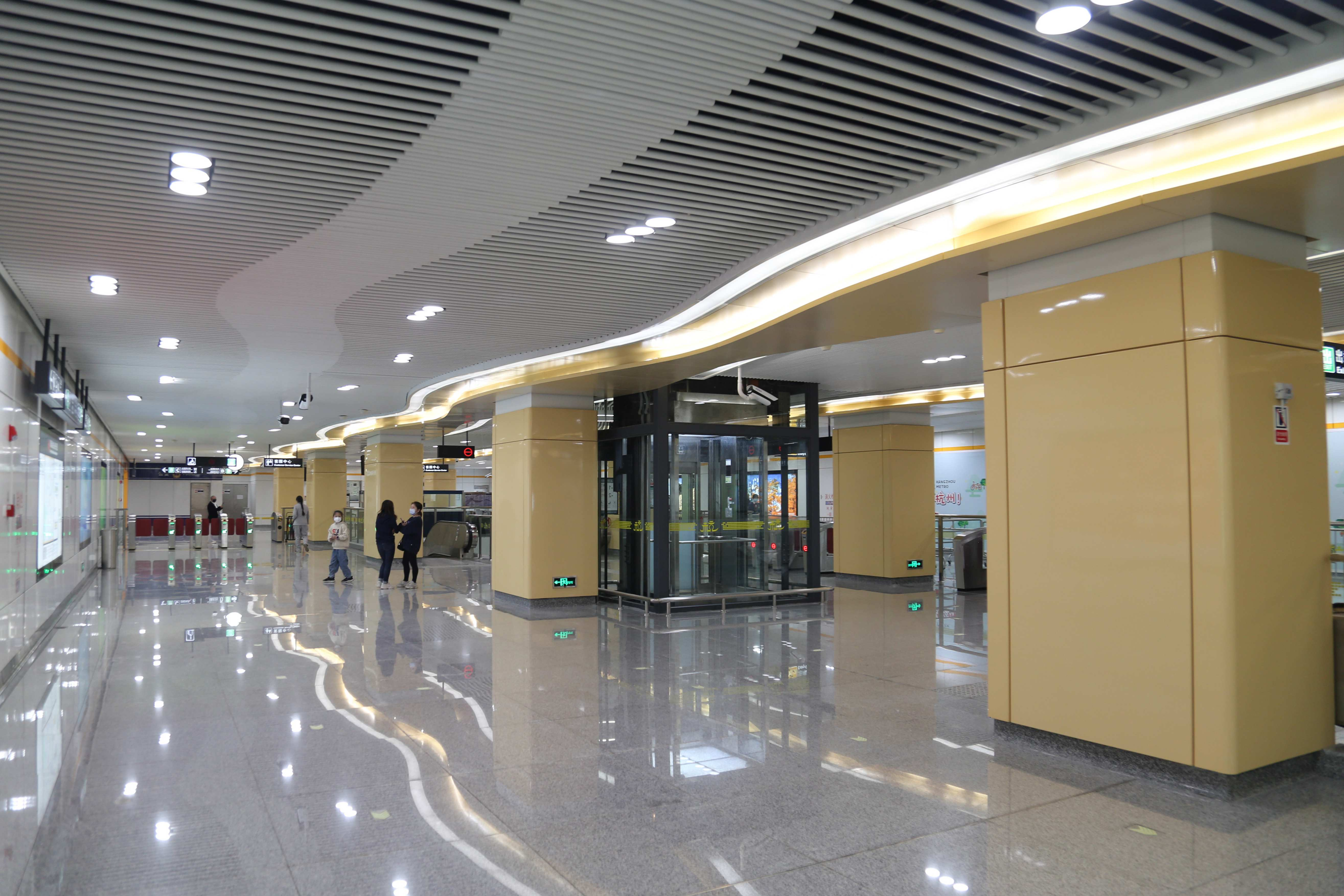 凤新路站站厅